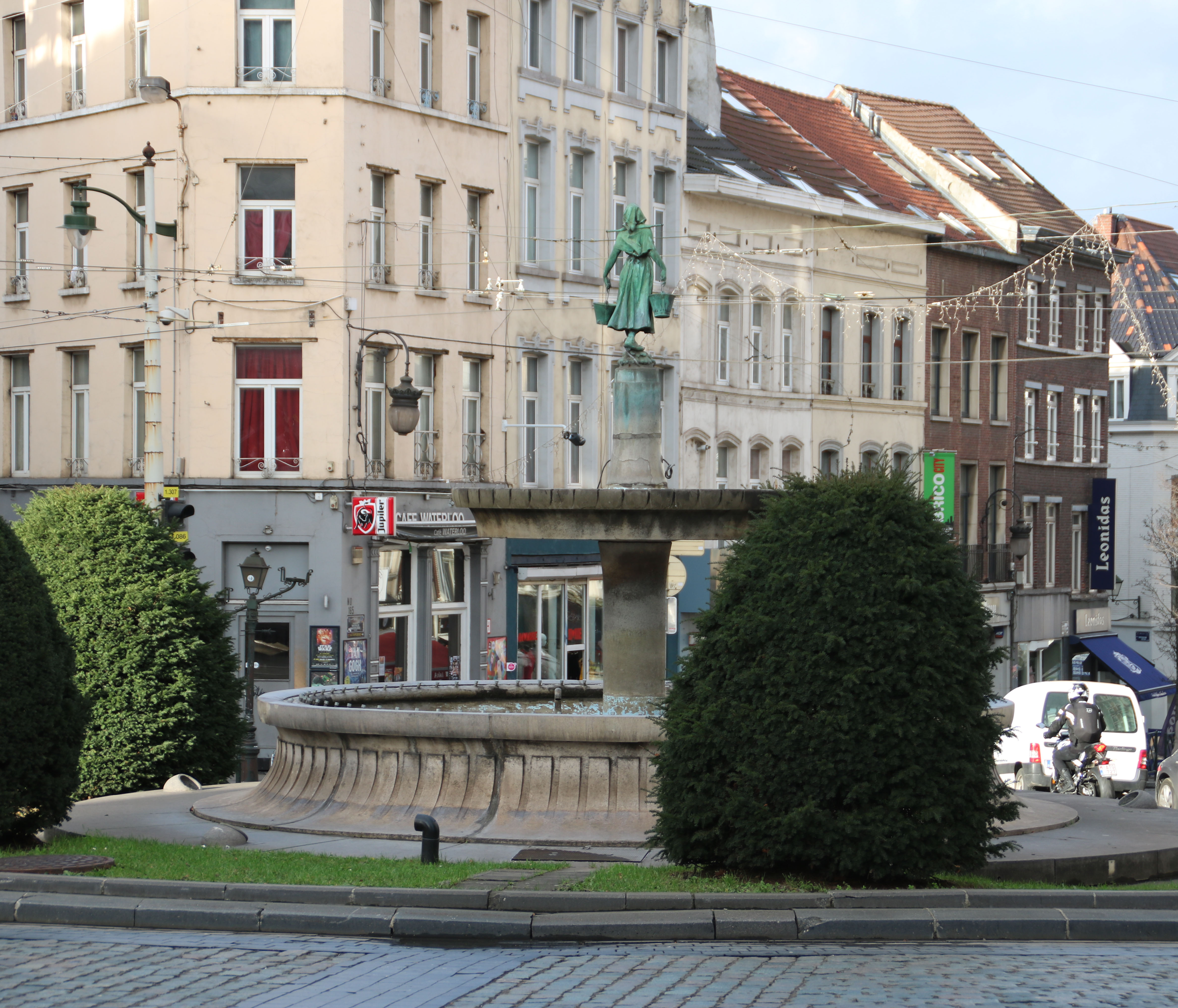 Rond point de la barrière de Saint-Gilles